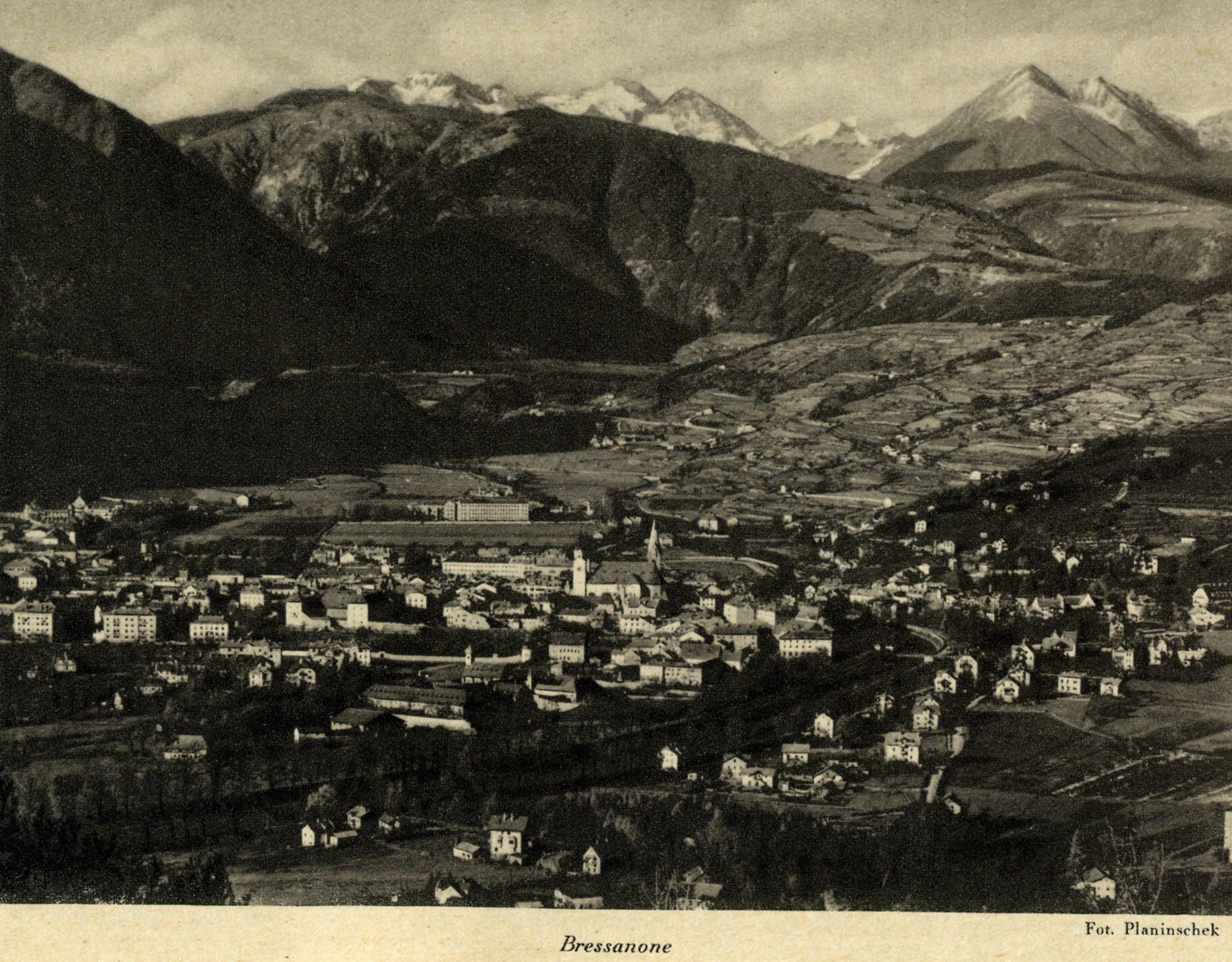 Bressanone, guida pratica del TCI, 1935